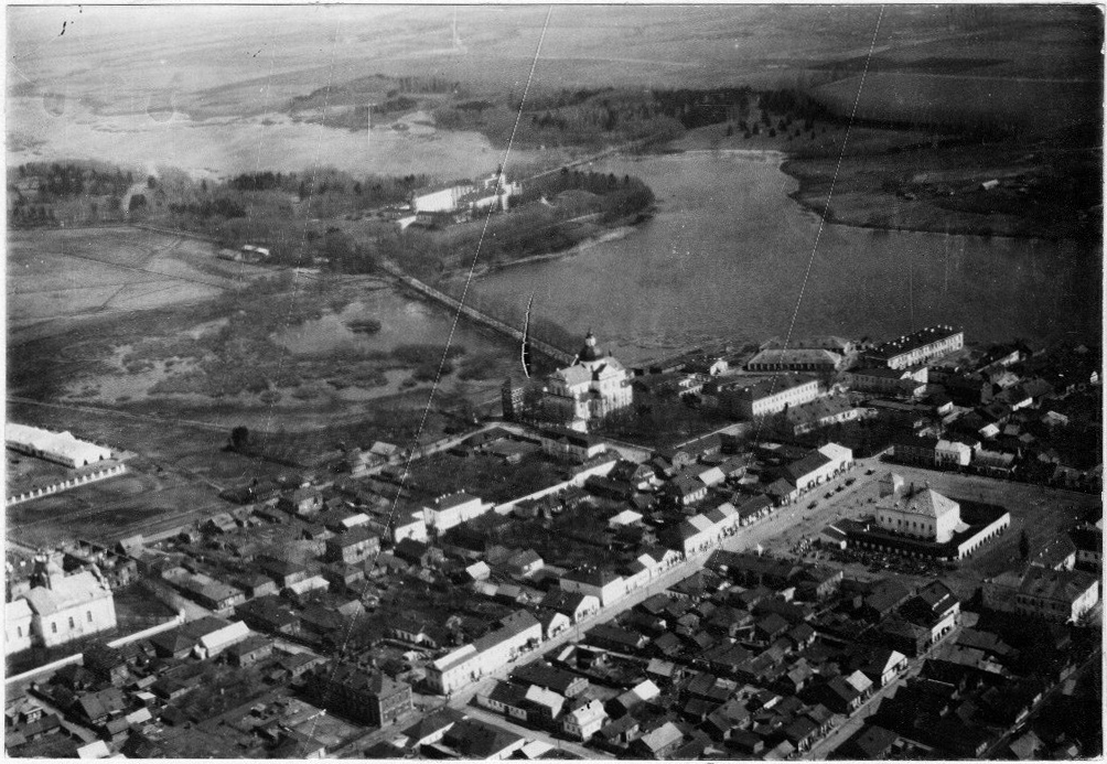 Беларуская (тарашкевіца): Нясьвіж (Niaśviž). Аэрафотаздымак